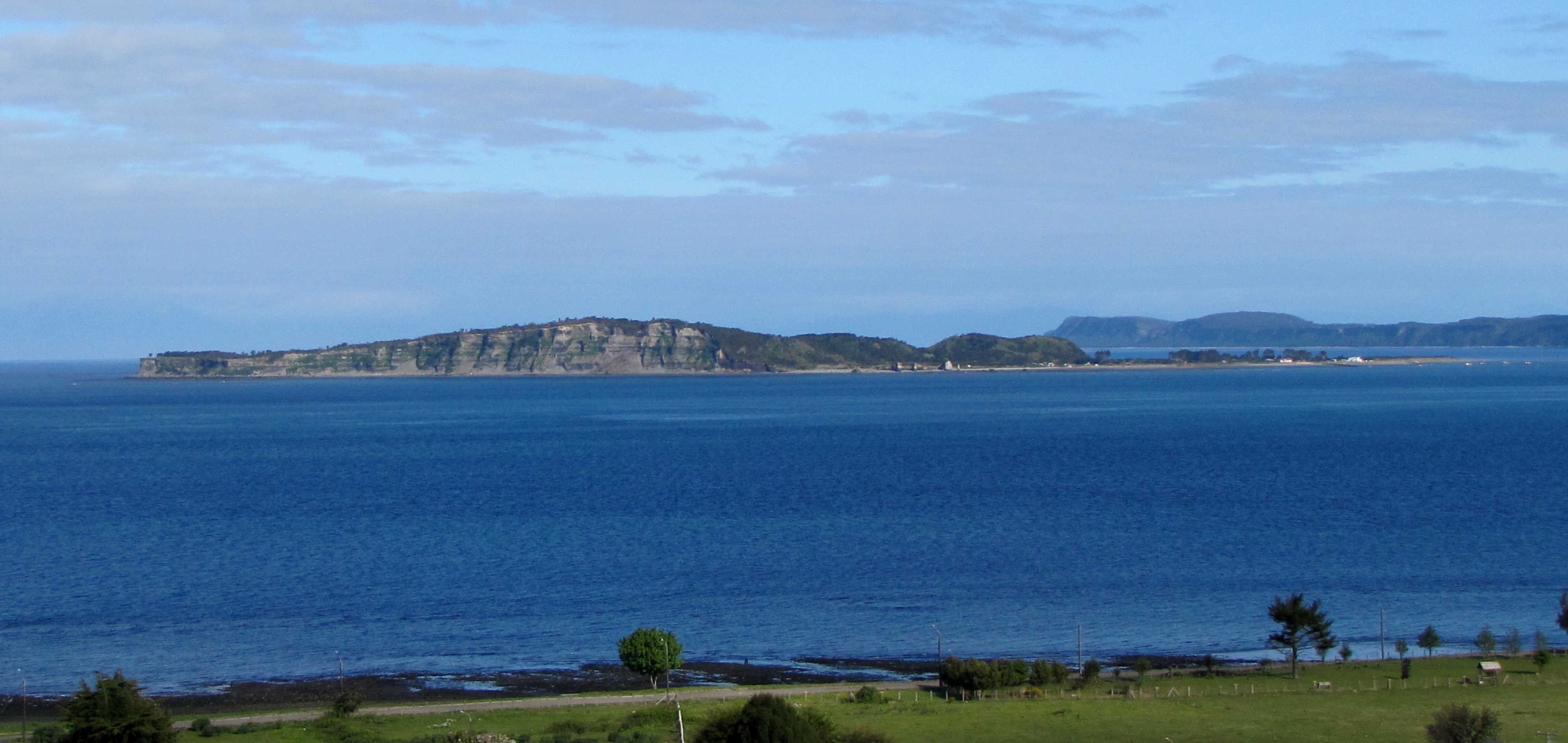 La isla Acui vista desde Queilen, Chile.